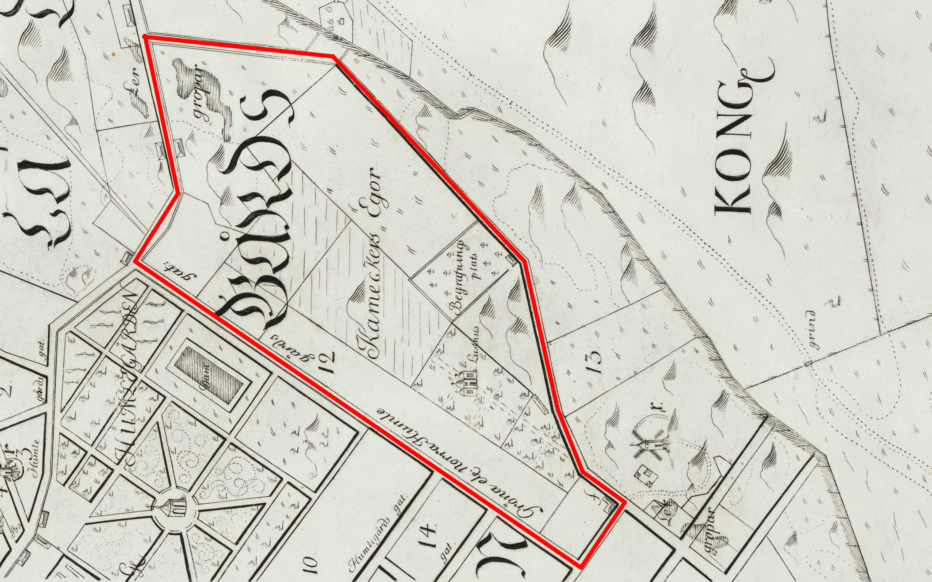 Kammeckers malmgård= "f", trädgård (röd) och kvarn= "r". Nr 12= kvarteret Kuhlberget d. mindre, 13= Diurgårdsbacken, 14= Hebacken d. större